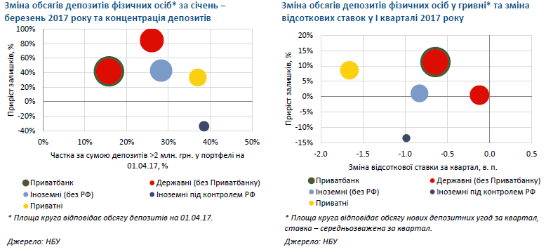 Зміна обсягів депозитів фізичних осіб у I кварталі 2017 року